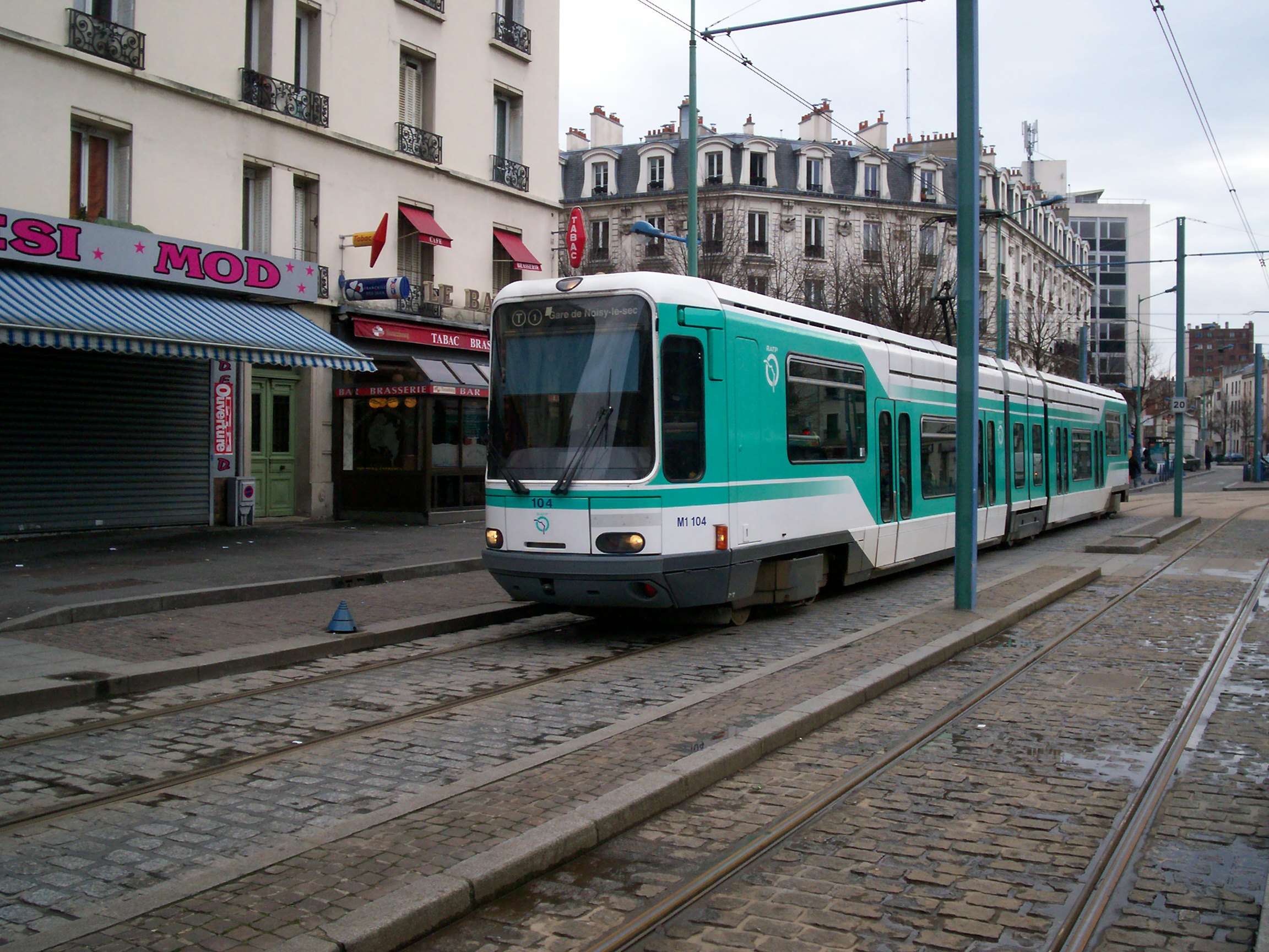 T1 à Théâtre Gérard Philippe